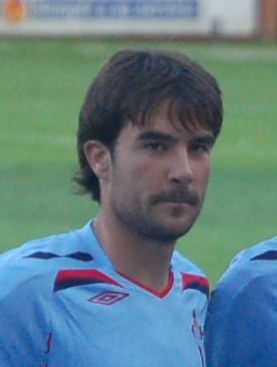 Aritz López Garai, no 2009 xogando co RC Celta de Vigo o trofeo Cidade de Pontevedra.